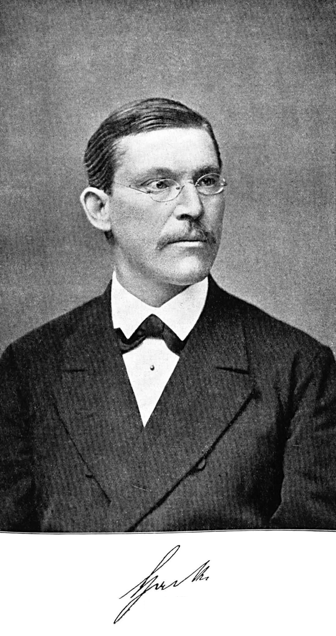 Theophil Friedrich von Hack.jpg, Porträt.